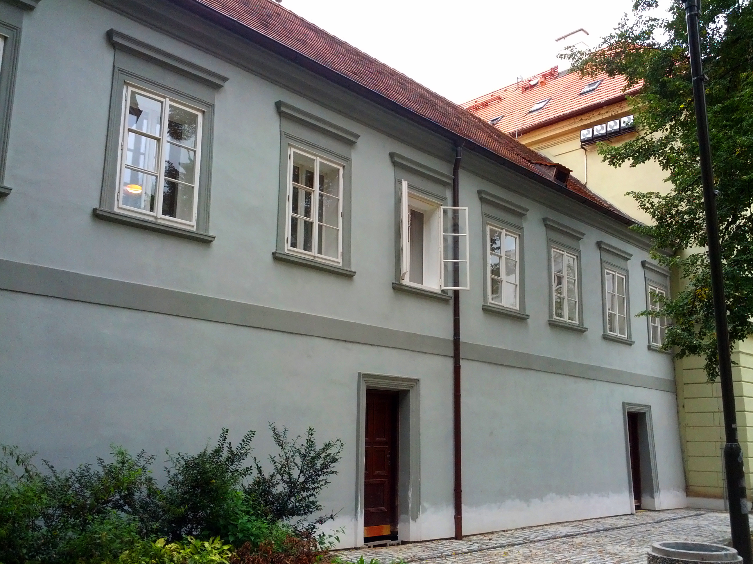 děkanství, U Černé věže 71/4, České Budějovice